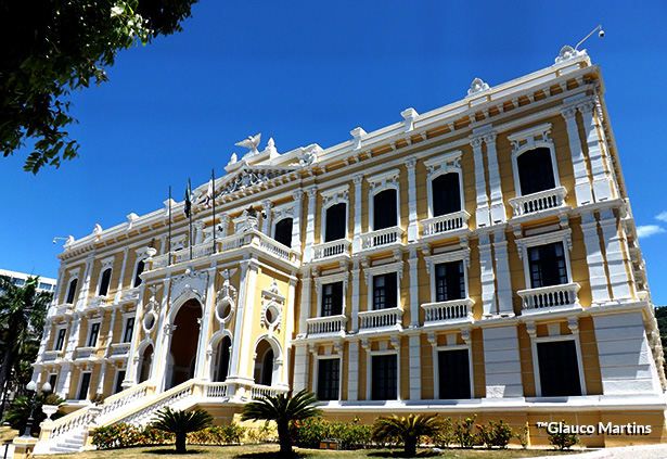 PALÁCIO ANCHIETA